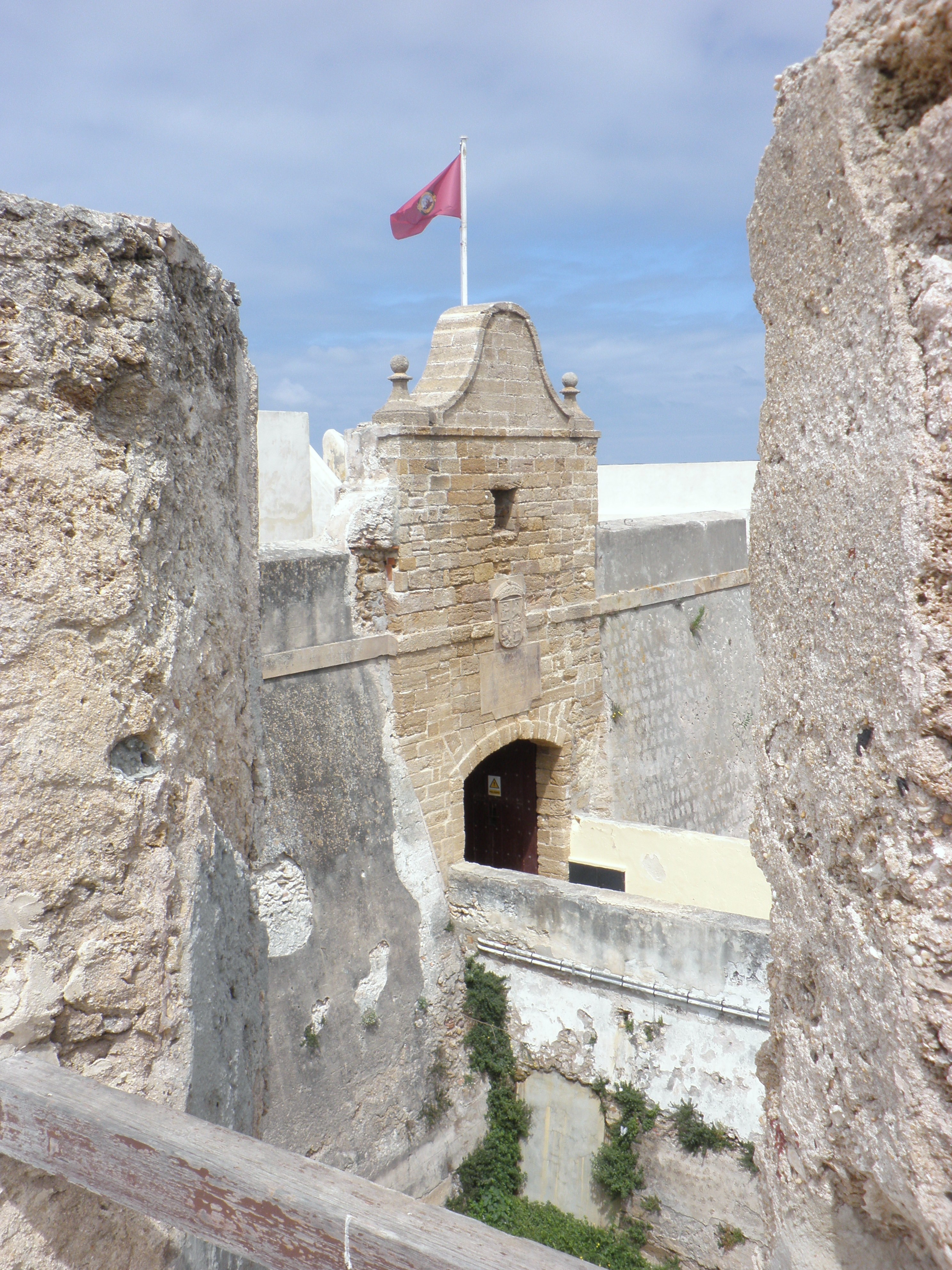 Castillo de Santa Catalina, Cádiz, España.